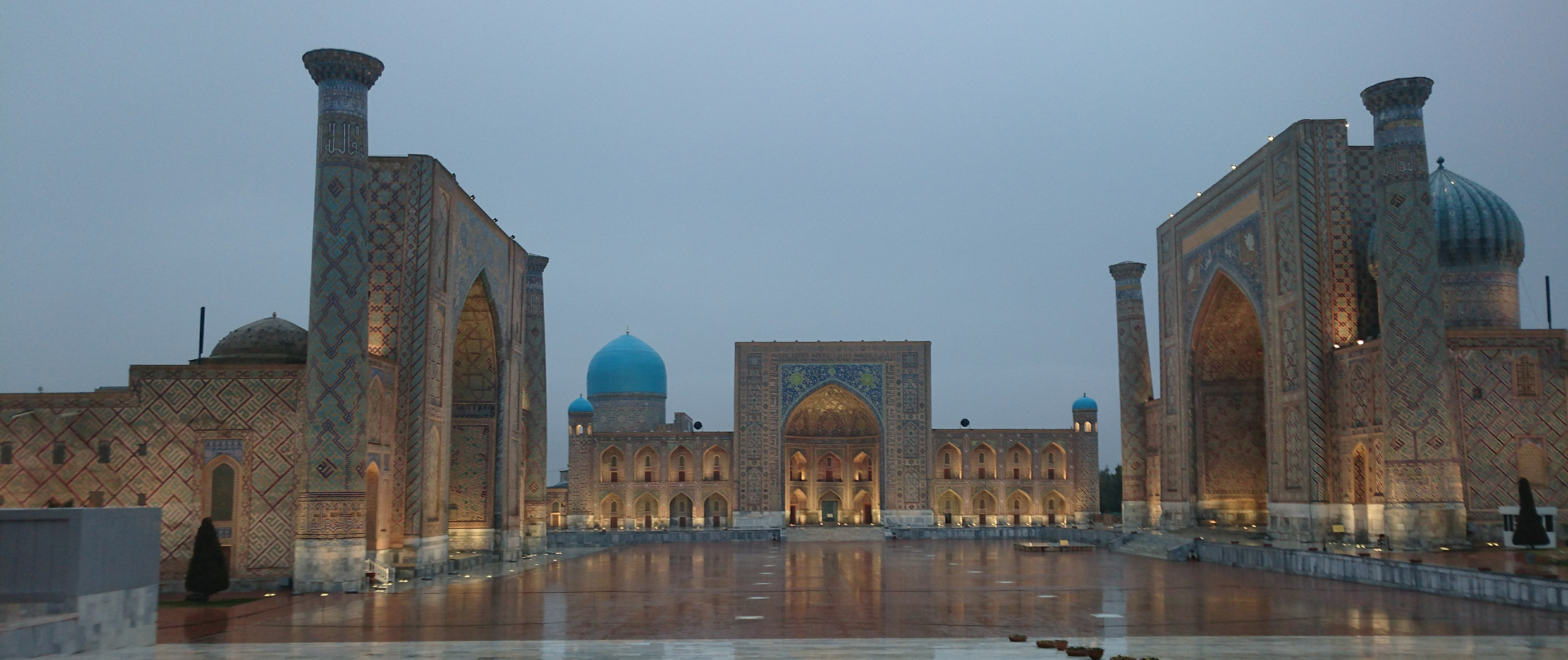 Registan three madrasahs_Samarkand